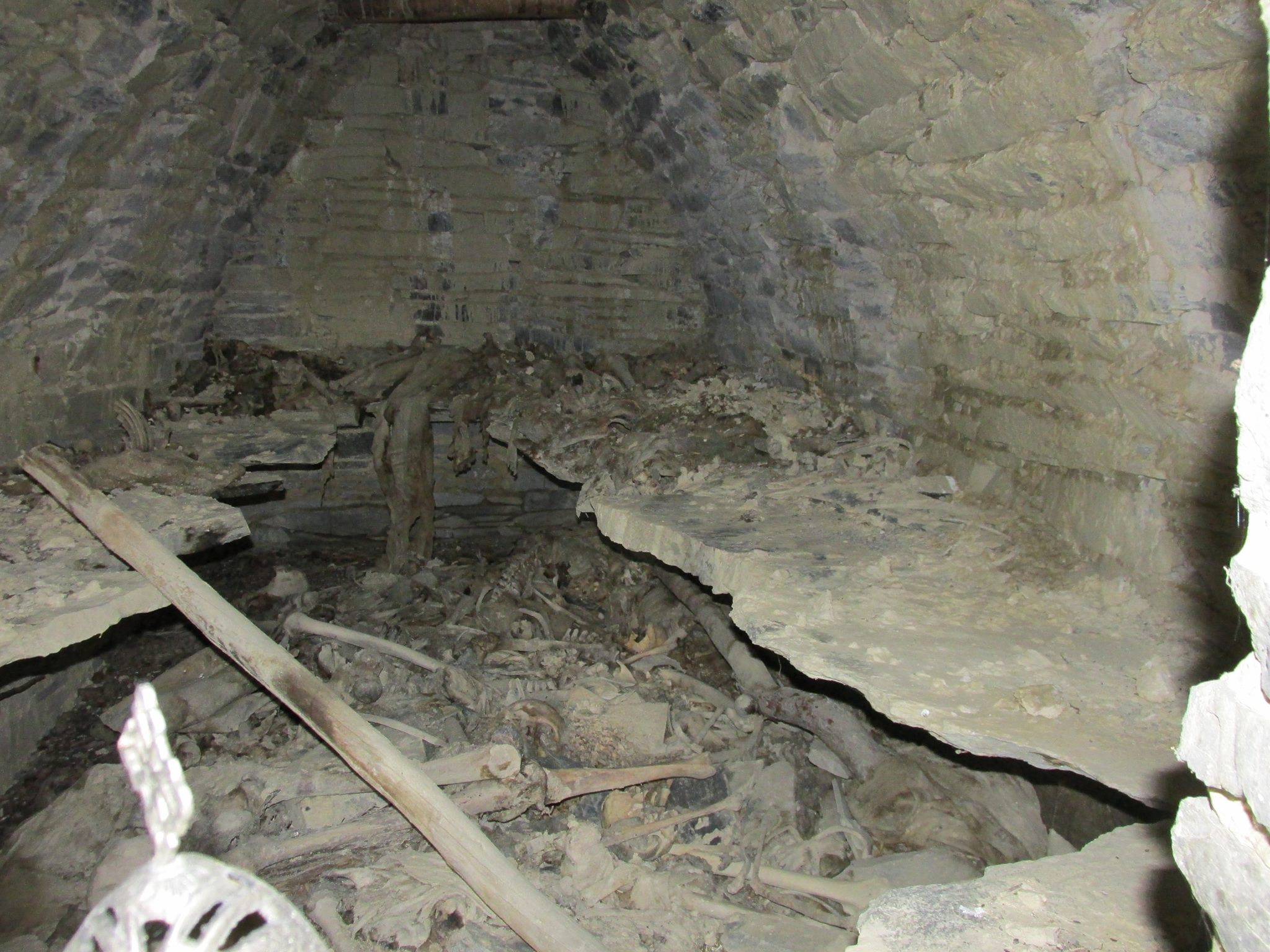 ანატორის აკლდამები